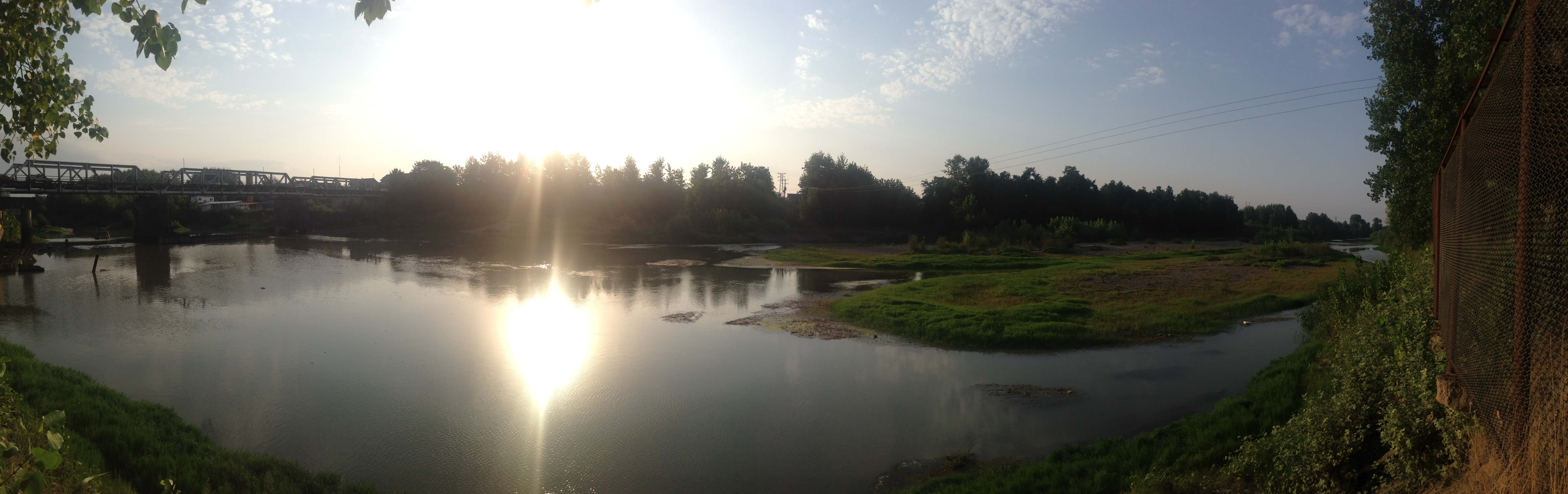 نمای ٣٦٠° از رودخانه سفیدرود